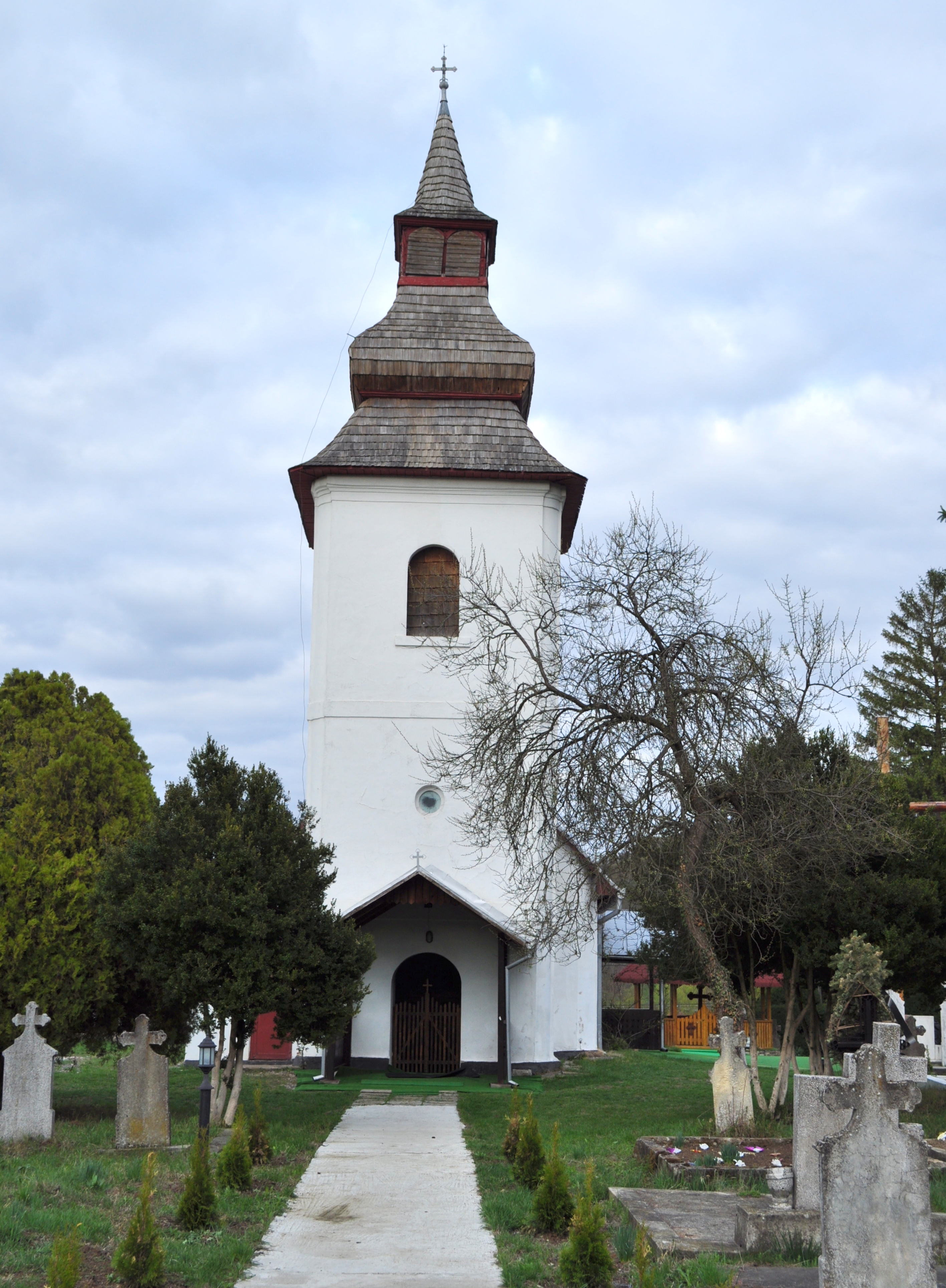 Biserica "Cuvioasa Paraschiva", sat LĂPUŞNIC; comuna DOBRA